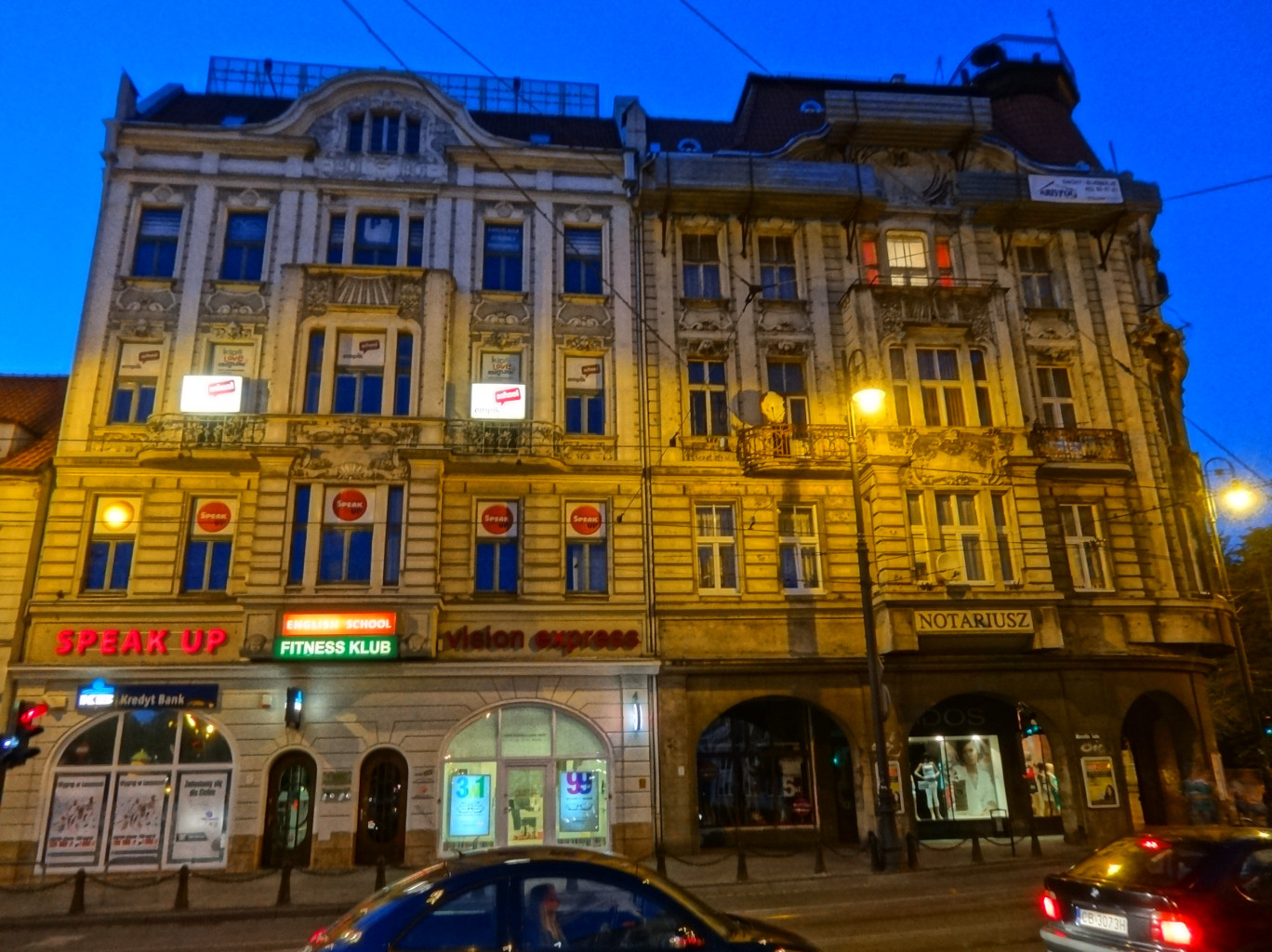 Kamienice ul. Ferdynanda Focha 2 i 4 w Bydgoszczy (1901-1902)